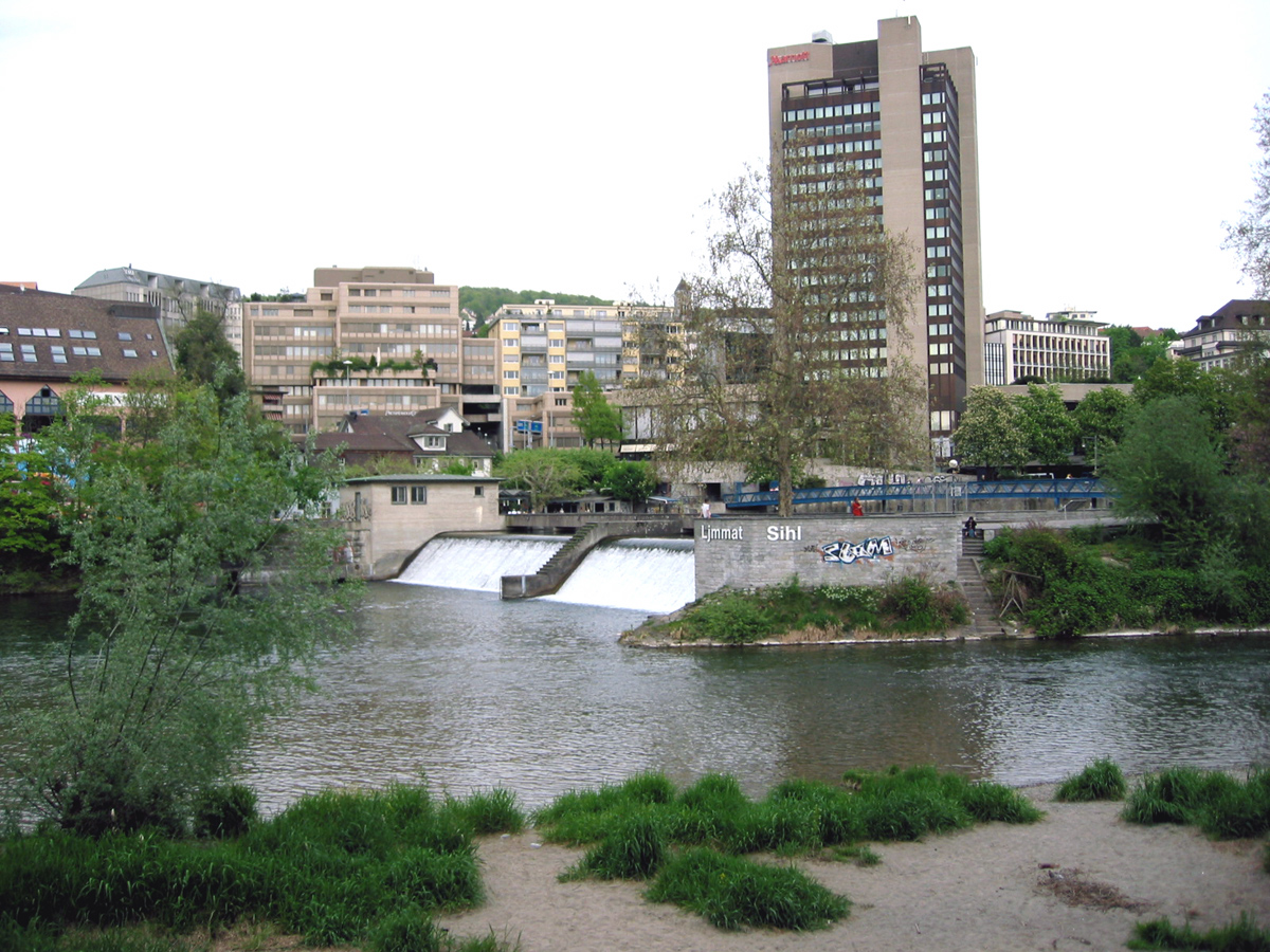 Zusammenfluss des Restwassers der zur Energieerzeugung gestauten Limmat mit der Sihl (vorne) beim Platzspitz in Zürich.